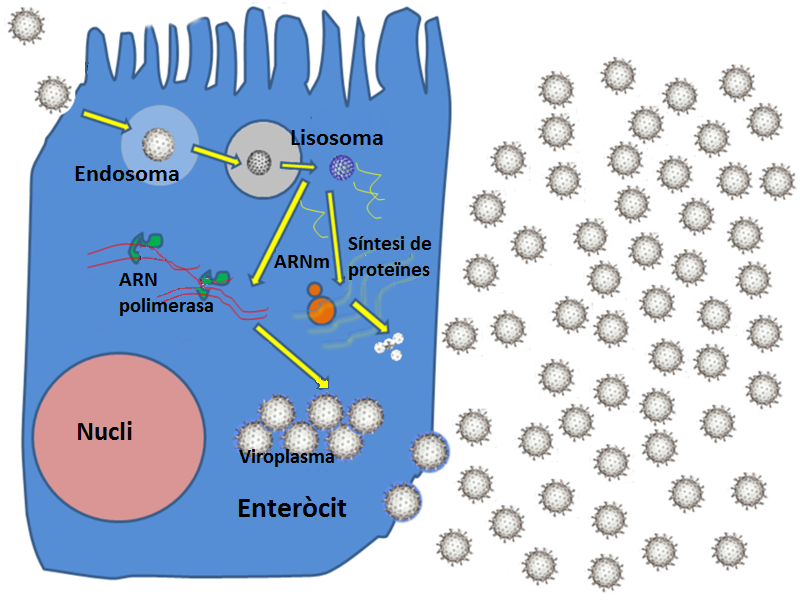 traduït de la wiki anglesa